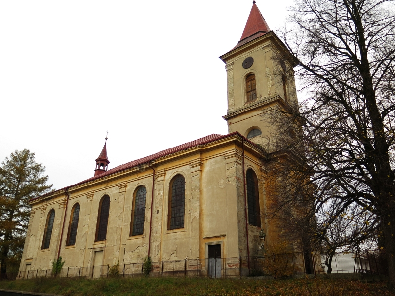 Kostel Narození Panny Marie, Osenice.